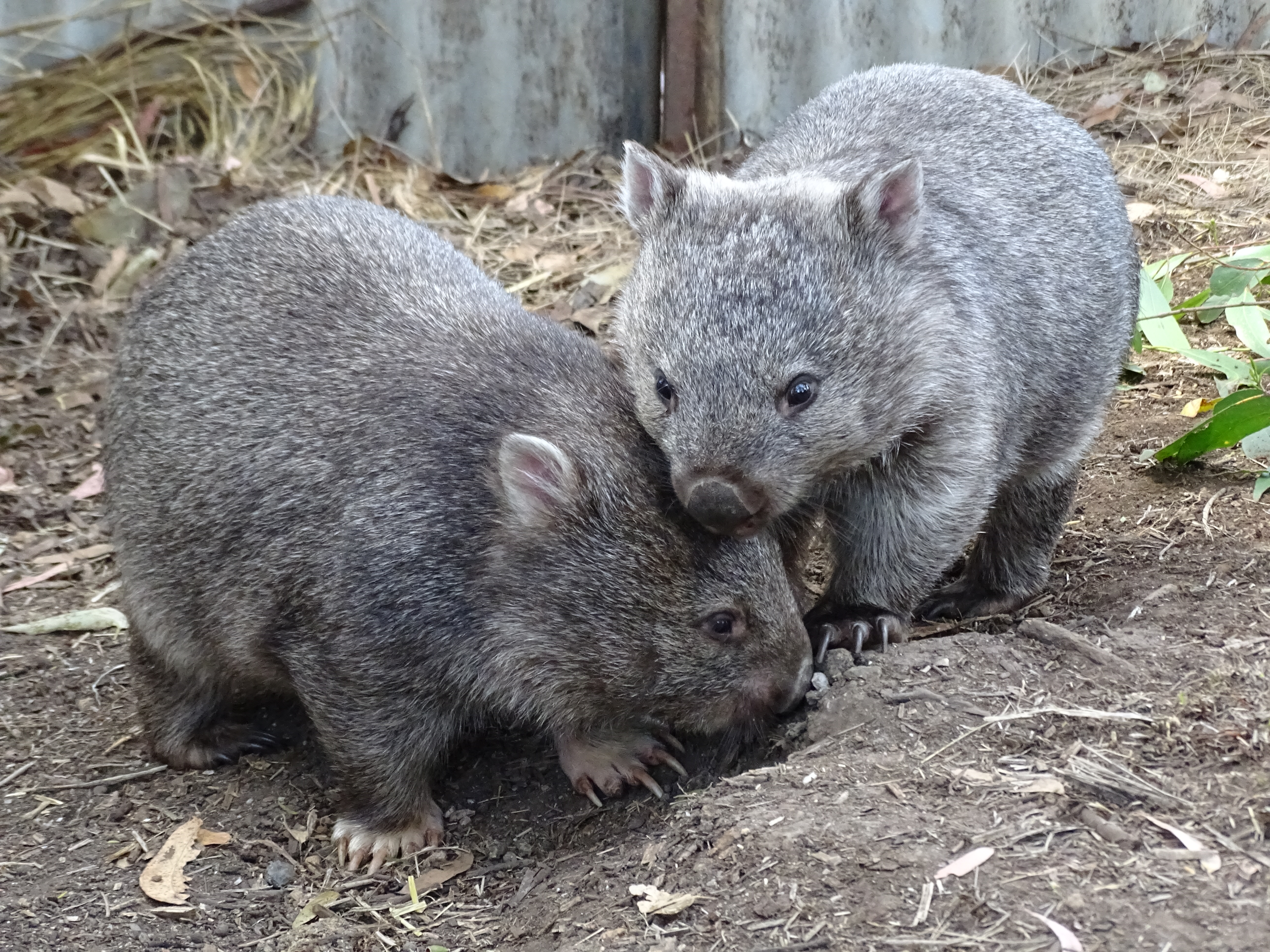 Nacktnasenwombat (Common wombat) Vombatus ursinus, Trowunna Wildlife Park, Tasmanien; fotografiert in Trowunna Wildlife Park